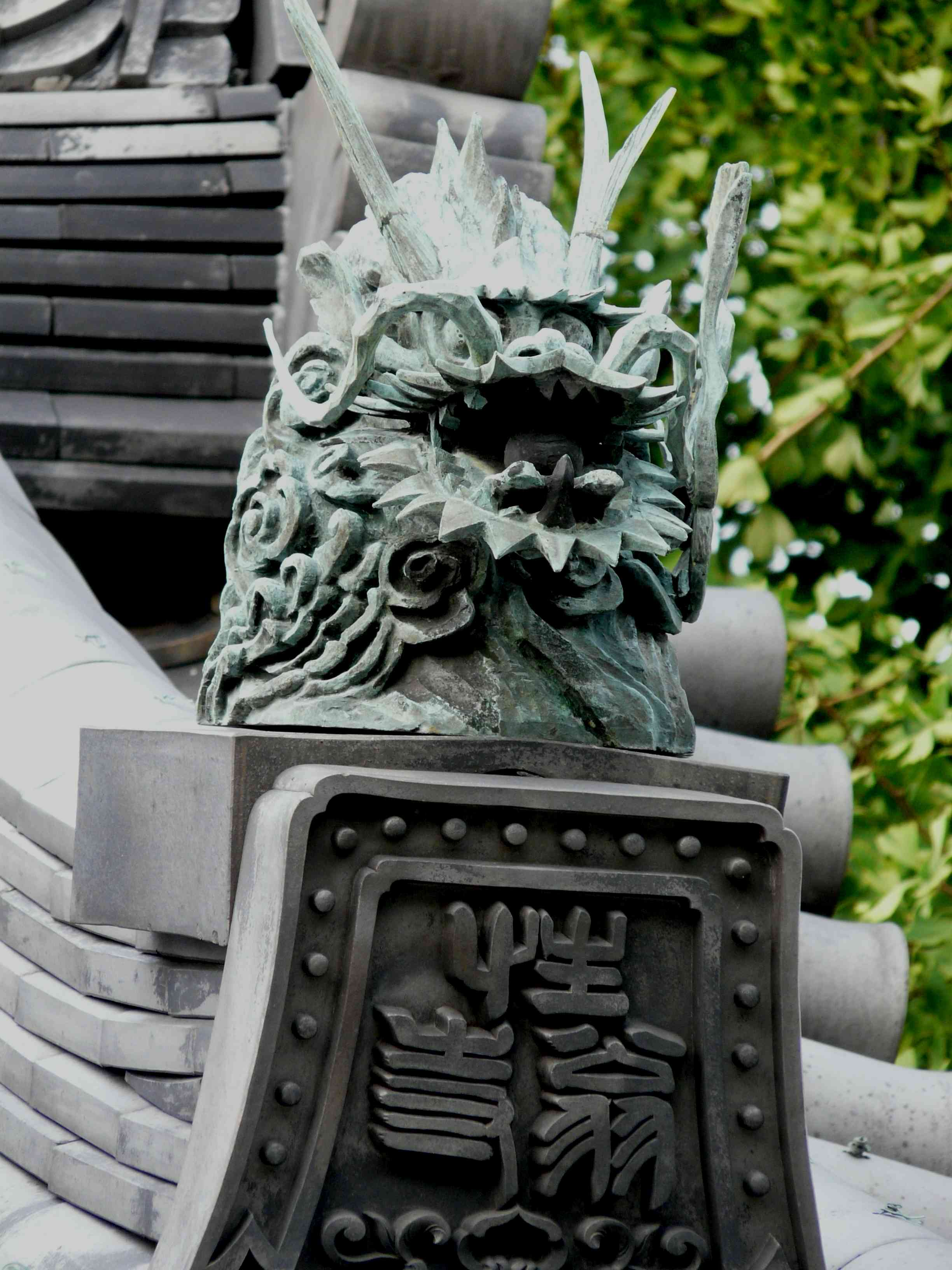 性翁寺山門龍燈